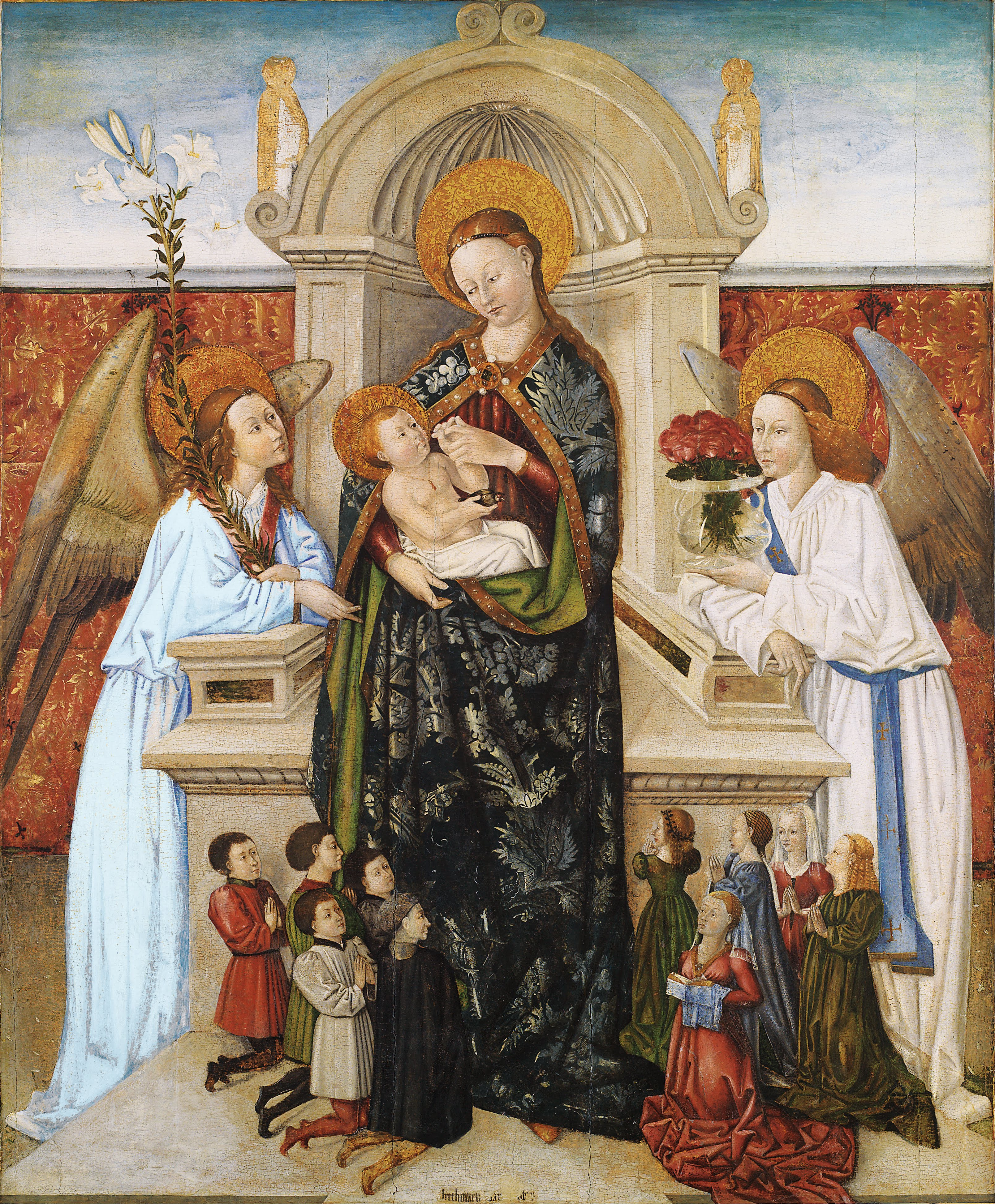 La table representa a la Virgen María junto a su hijo, el Niño Jesús, que es llevado en brazos por su madre, junto a un grup de ángeles y la familia de los donantes de la obra.